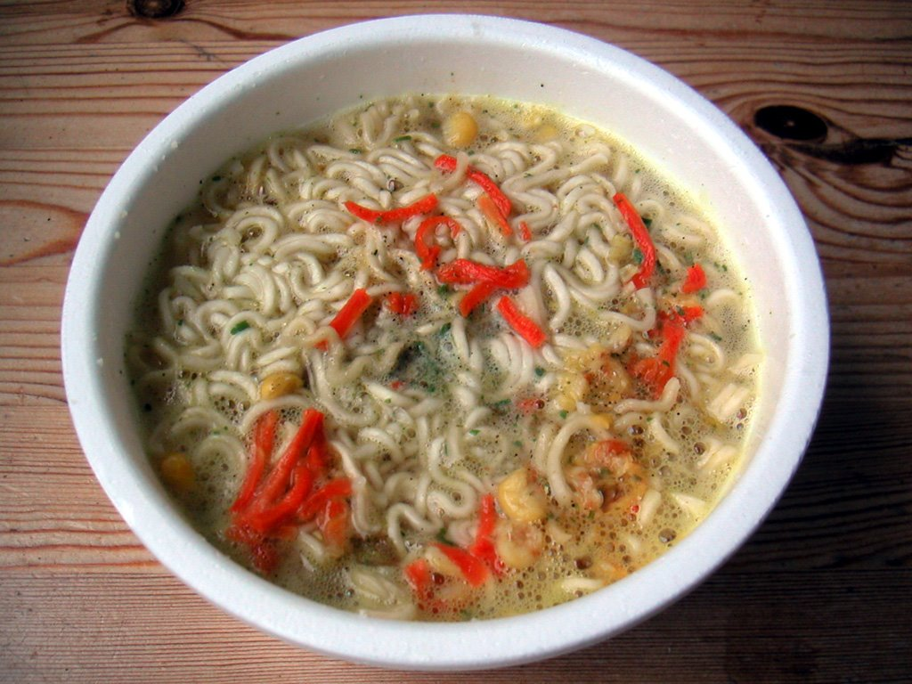 Nudelsuppe